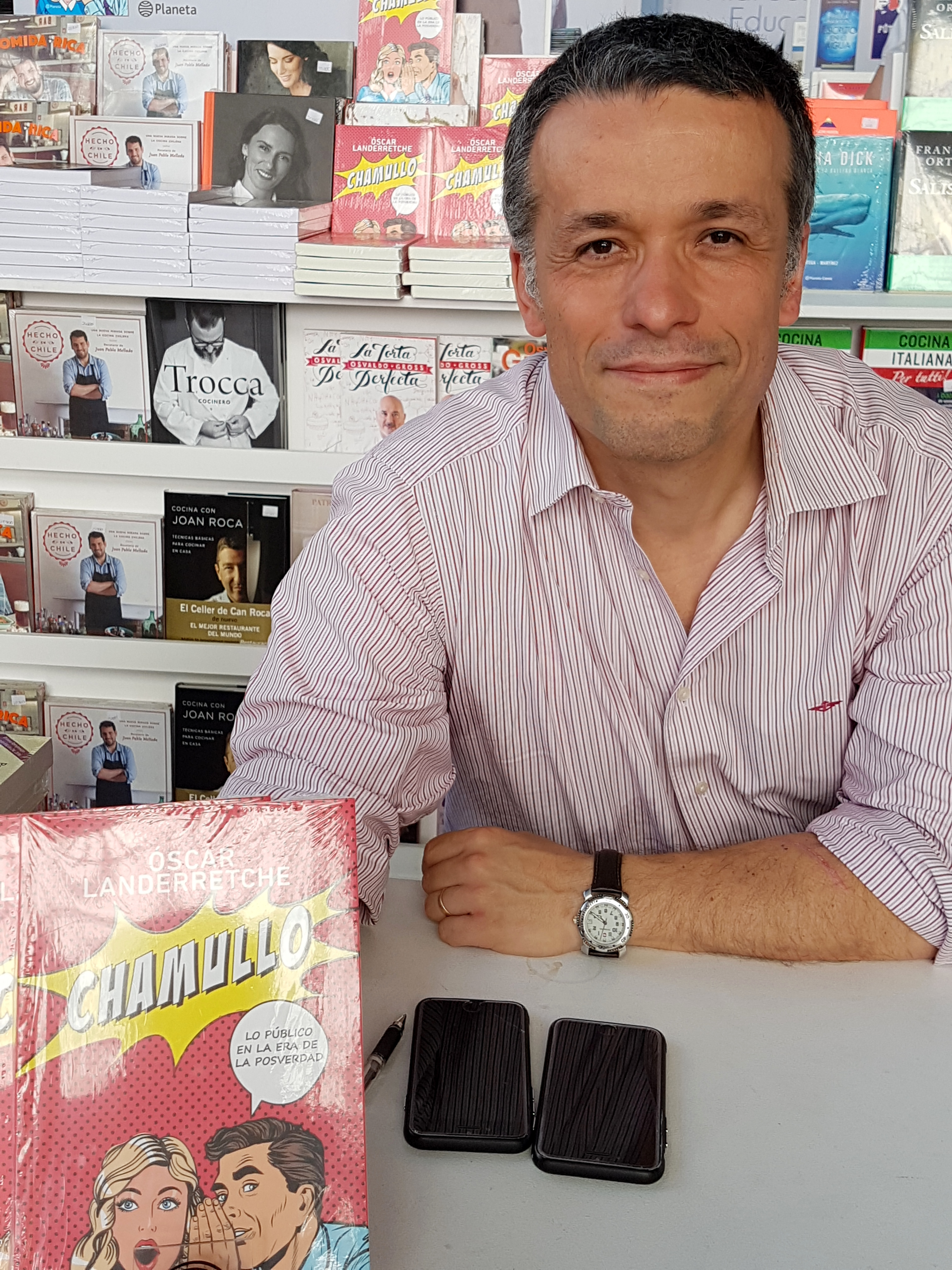 El economista chileno Óscar Landerretche Moreno en la Feria Internacional del Libro de Santiago 2017.